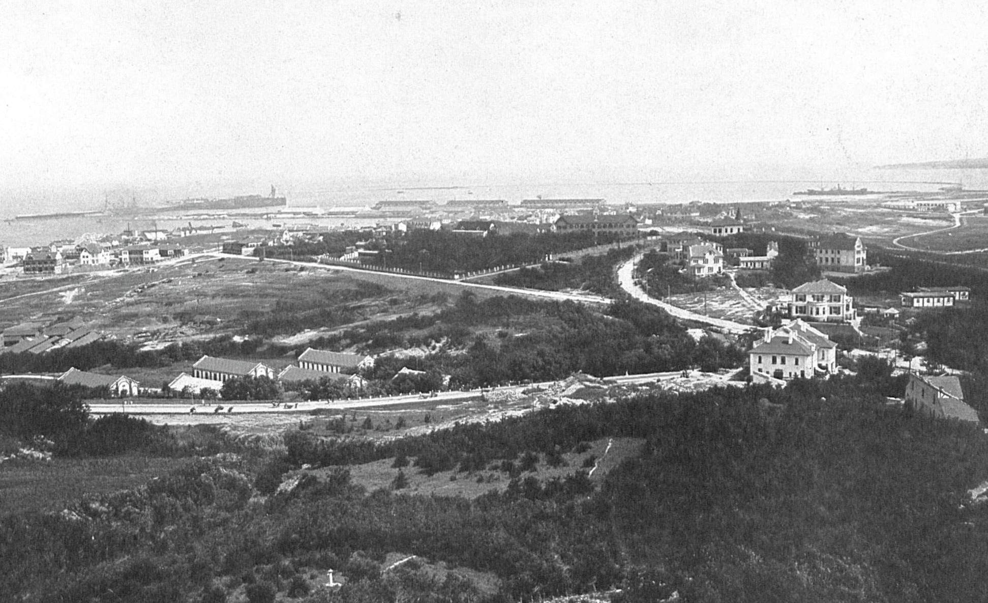 青岛教会山1 Missionshuegel Tsingtau